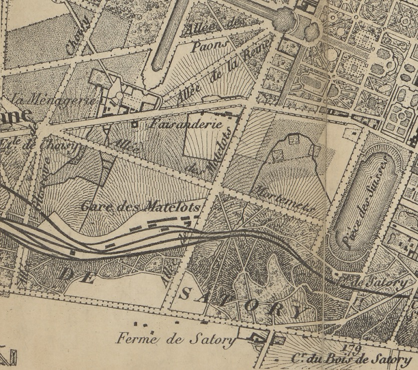 Détail centré sur la gare des Matelots d'un plan de l'ouest de Paris et de la banlieue ouest.